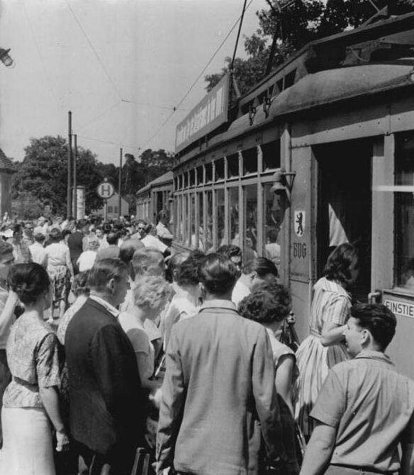 Zentralbild-He-2. 7. 61 Tropenhitze in Berlin Die tropische Hitze über Berlin zog tausende Einwohner der Hauptstadt der DDR am Wochenende in die wasserreiche Umgebung. UBz: Am S-Bahnhof Grünau war Ansturm auf die Strassenbahn, die zum Strandbad Grünau und nach Schmöckwitz fährt.